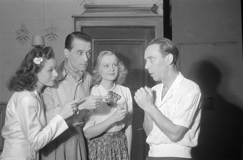 Original image description from the Deutsche Fotothek Szenenbilder mit Rudolf Platte